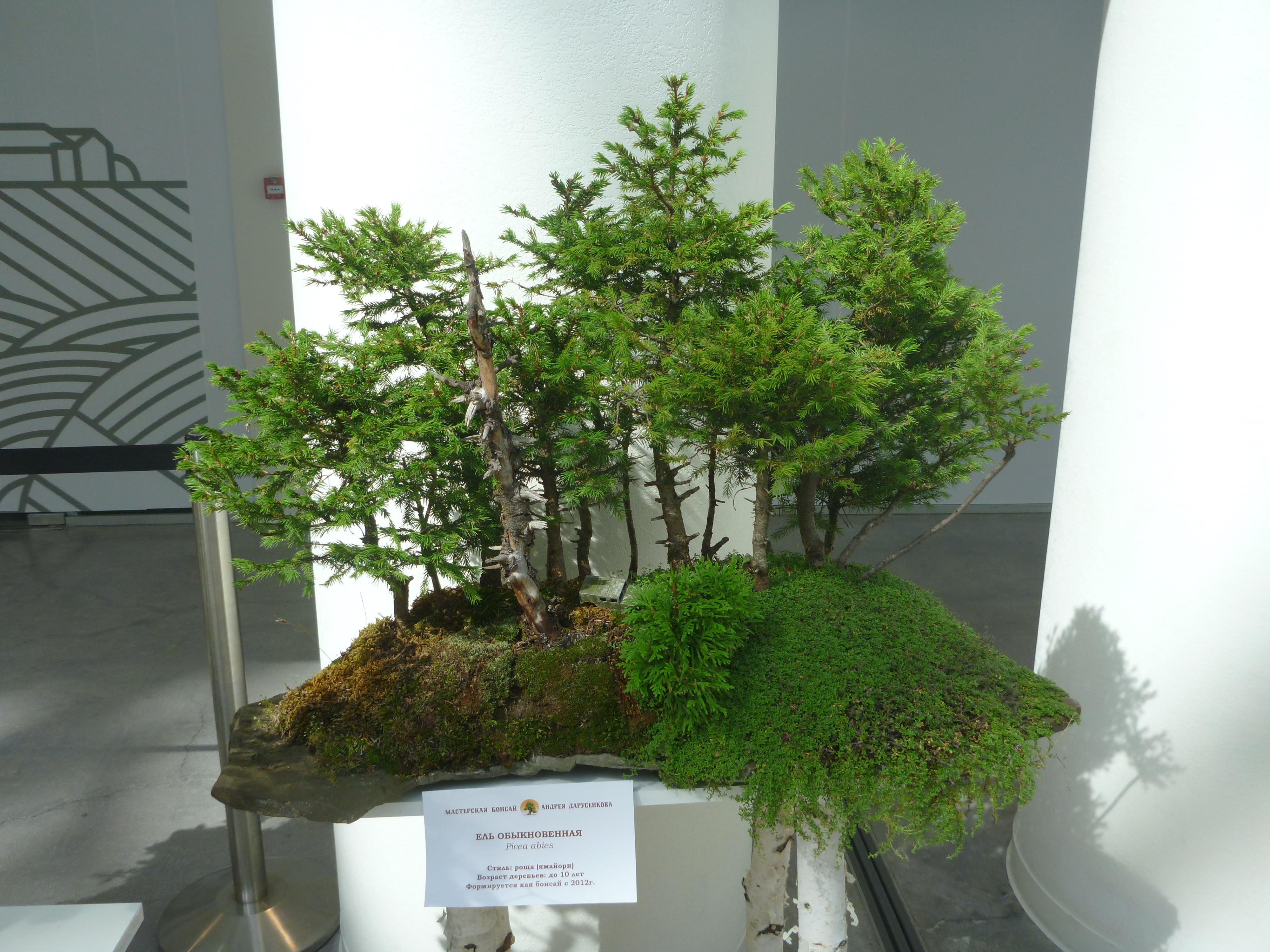 Ель обыкновенная бонсай в Ельцин-центре 2019 год